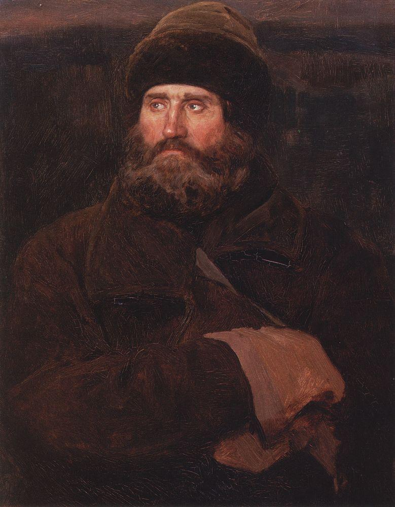 Иван Петров, крестьянин Владимирской губернии. Этюд Виктора Васнецова для картины «Богатыри». 1883 год